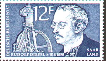 почтовая марка